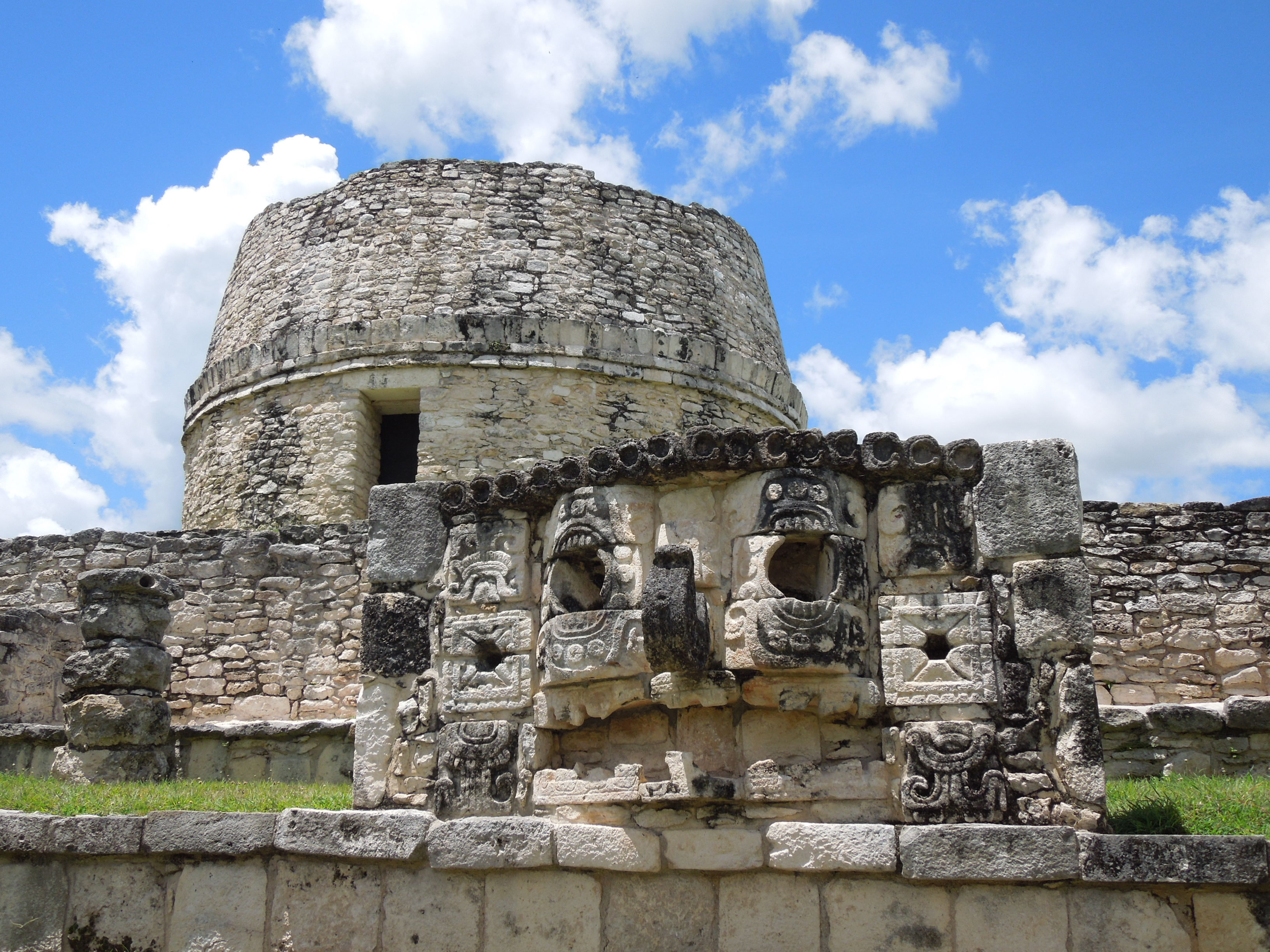 Mayapan